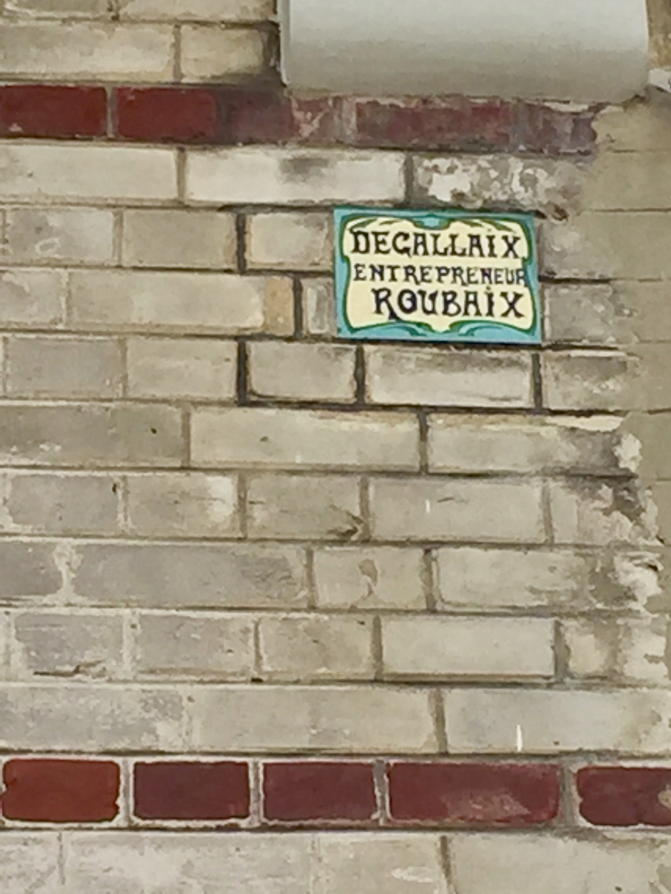 Villa Monéjan avenue Saint-Jean, Le Touquet-Paris-Plage plaque de l'entreprise Degallaix.